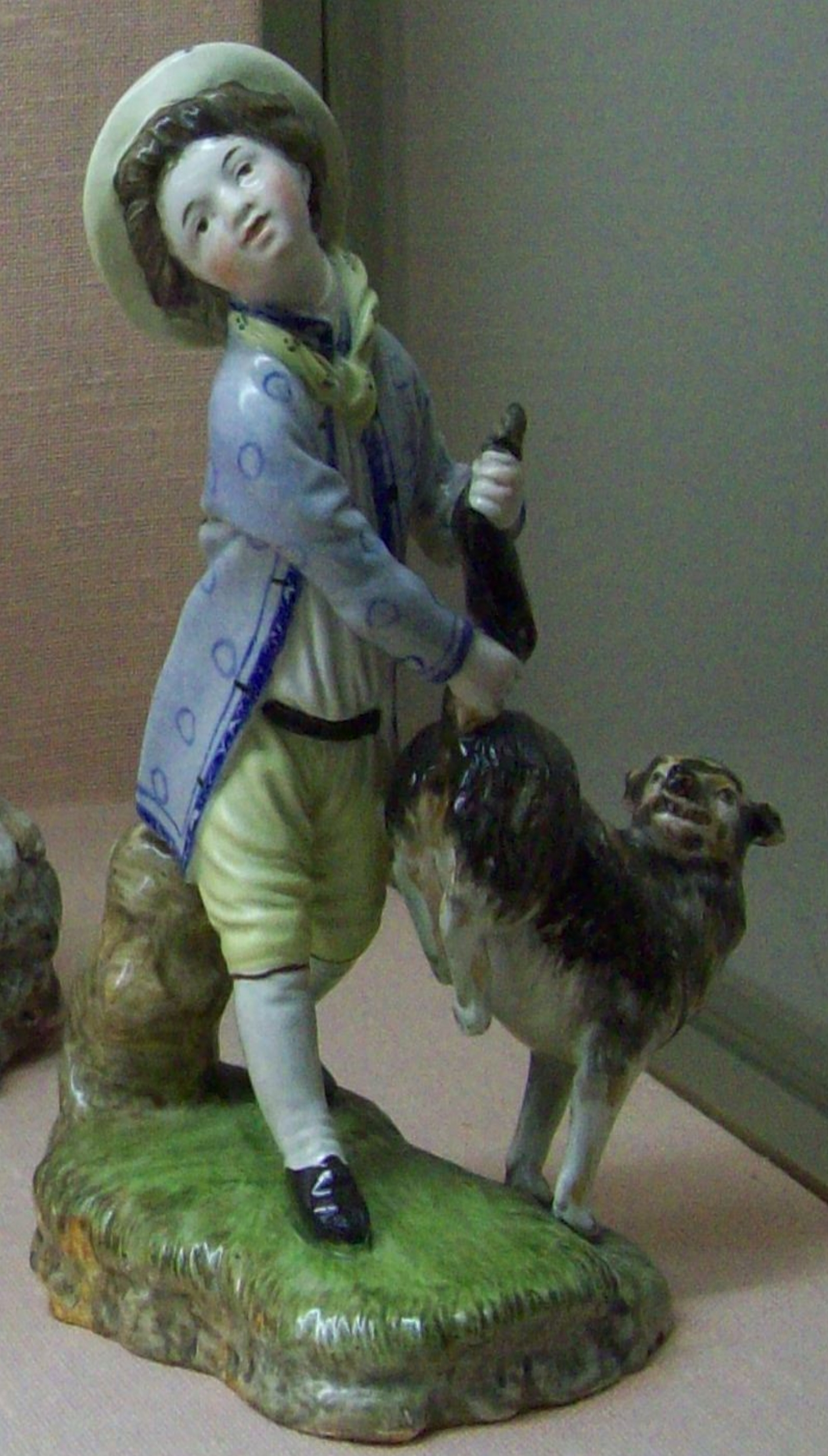 Der geduldige Spitz - Dammer Steingut - Museen der Stadt Aschaffenburg - Schlossmuseum